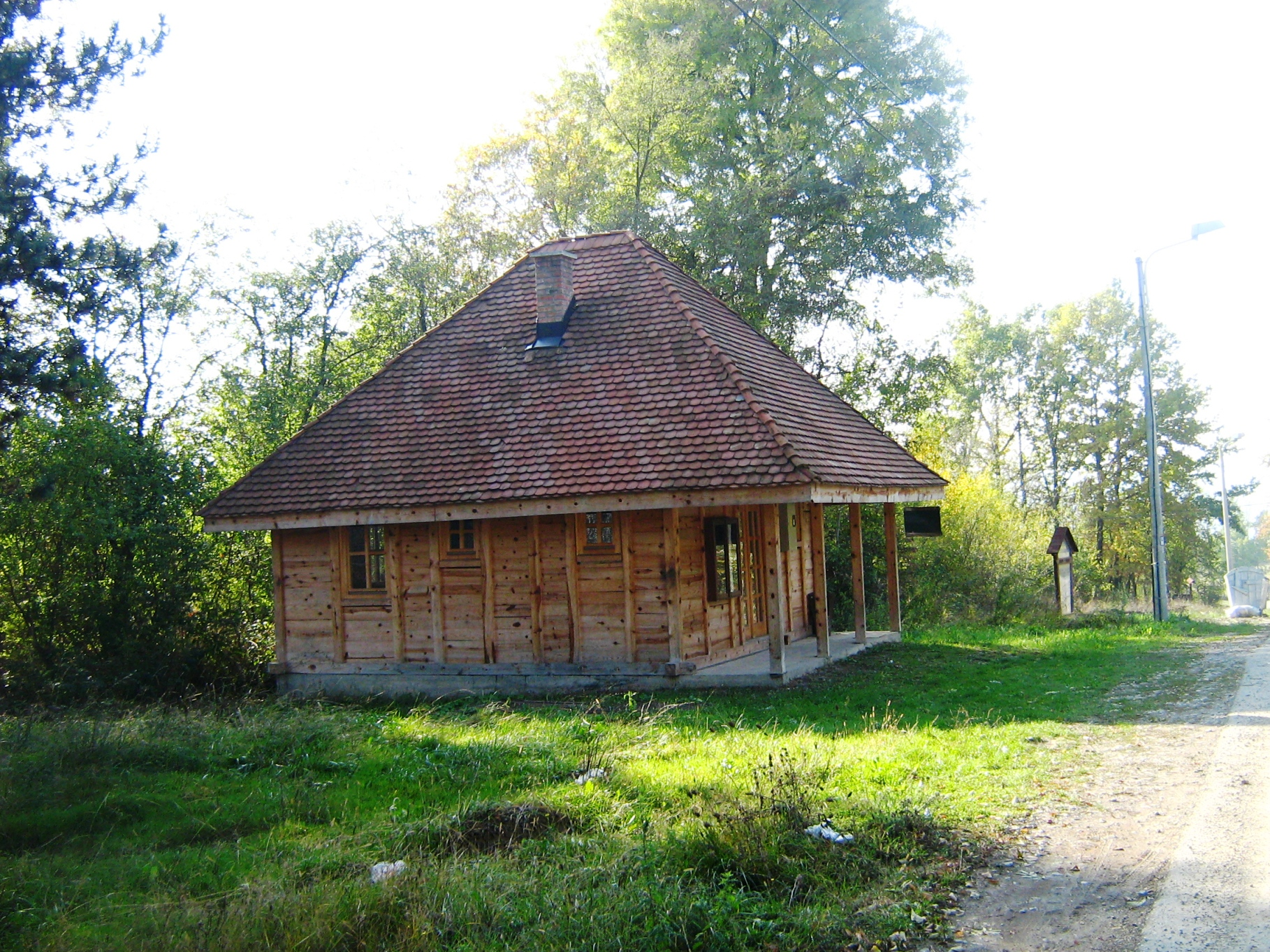 Туристичка кућа у селу Росићи.